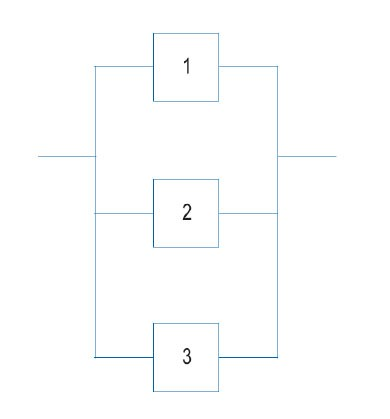 Paraleloko sistemaren adibidea.